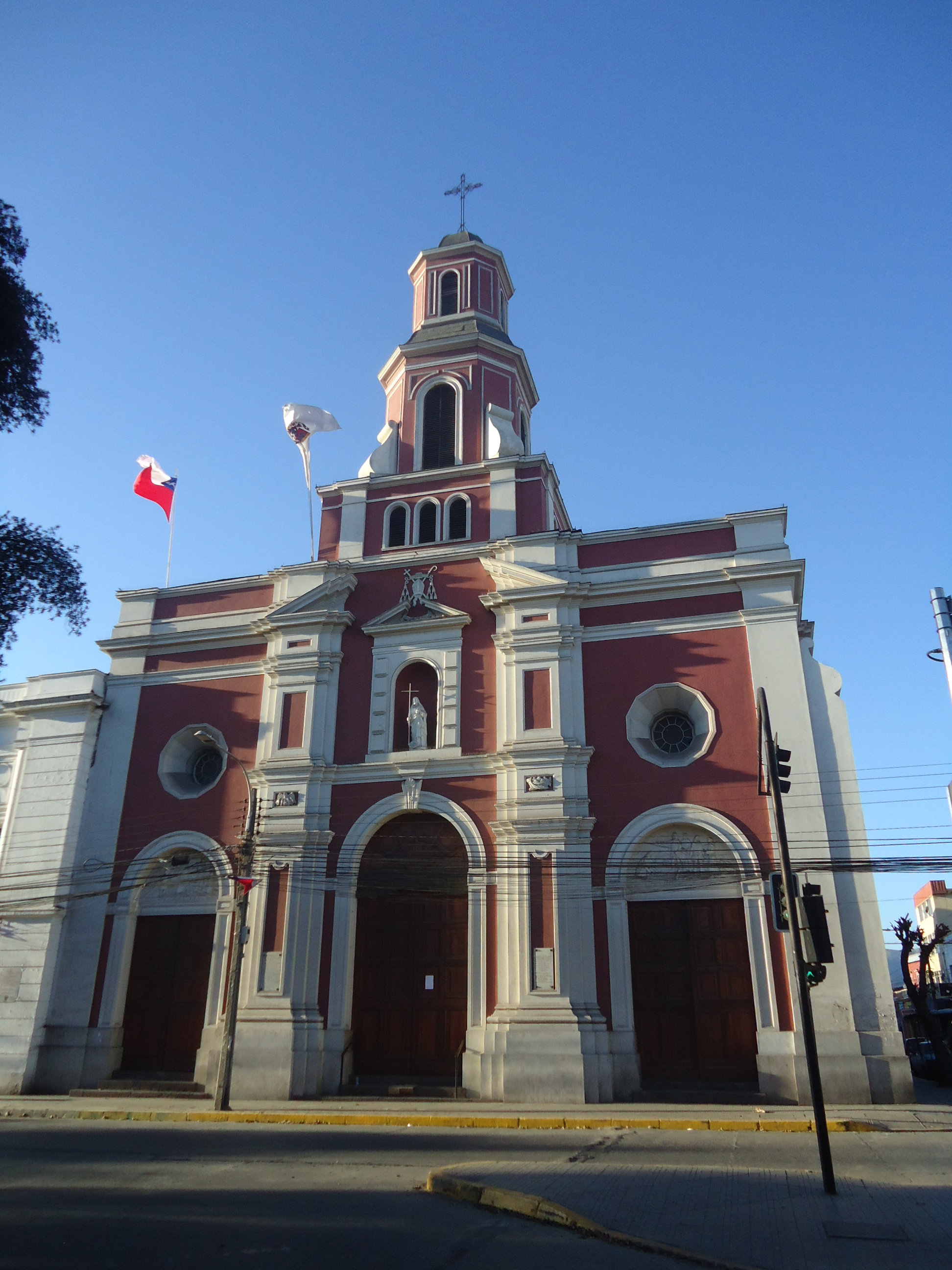 San Felipe de Acocagua